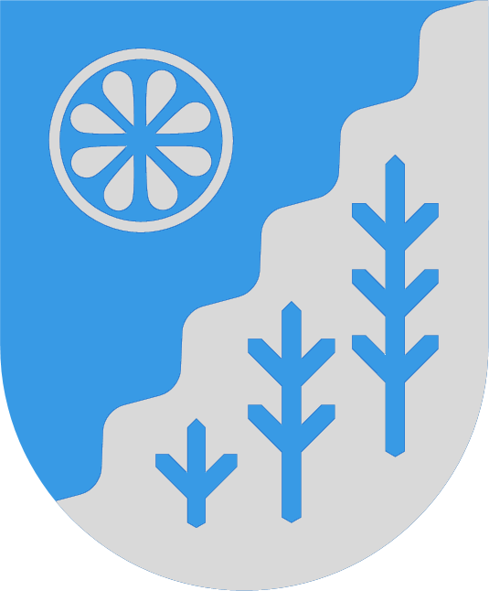 Kose valla vapp.